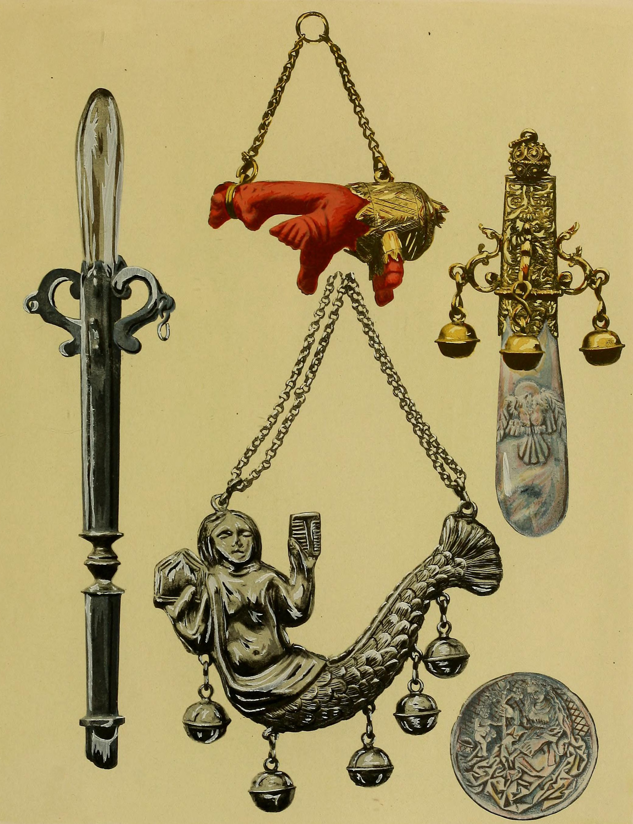 Illustration from Histoire des jouets